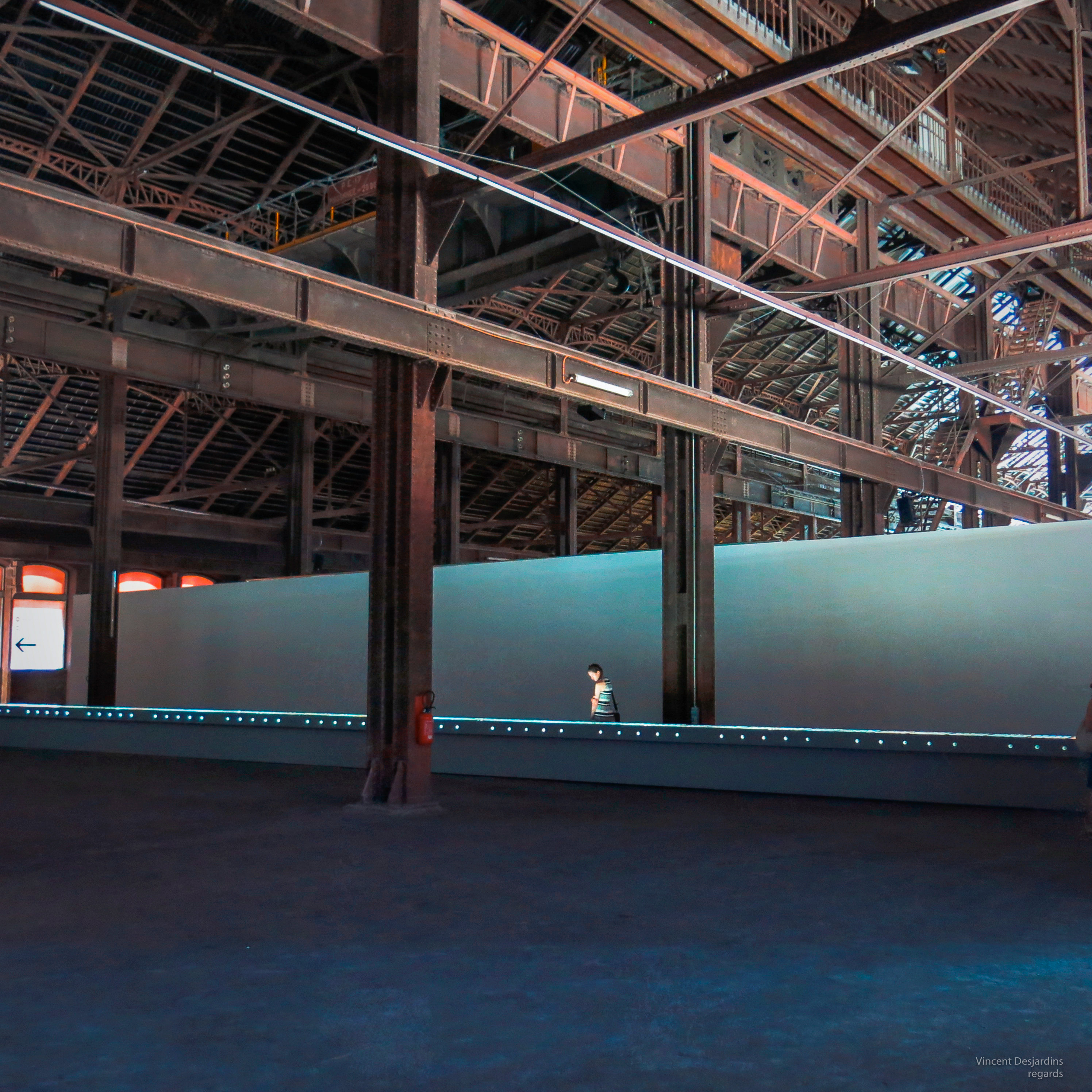 Vue intérieure de la Grande Halle d'Arles et de sa charpente métallique.